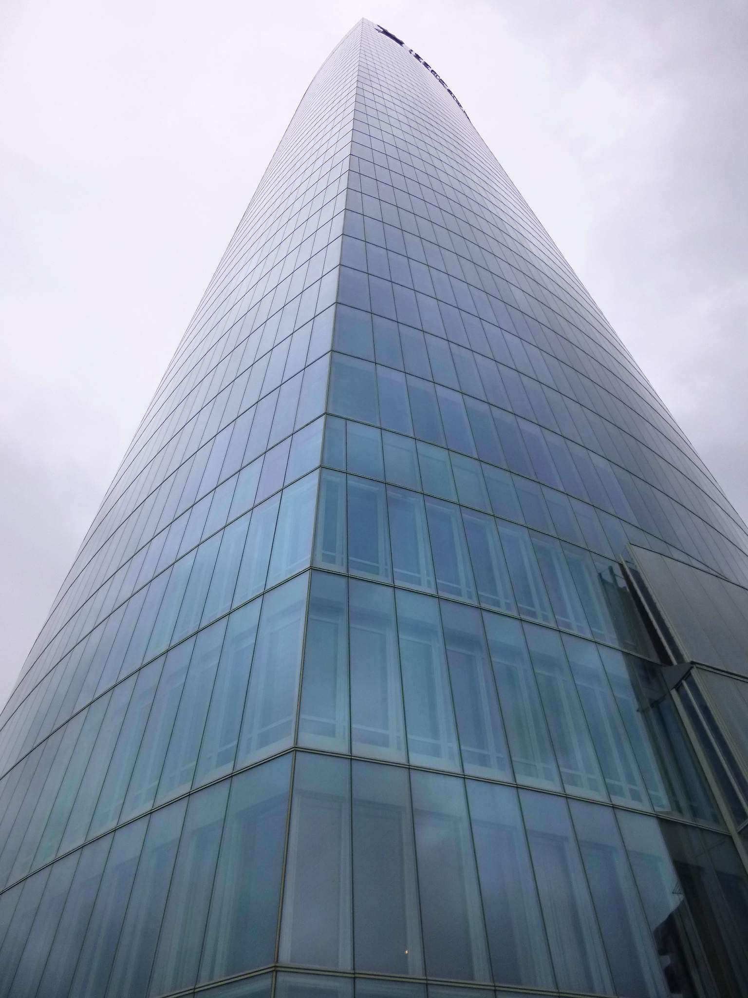 Torre Iberdrola (Bilbao)